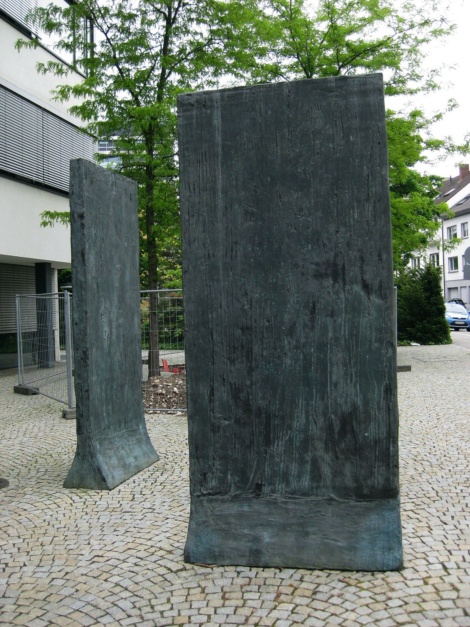 Günther Förg, o. T., 2000, - Deutschland, Baden-Württemberg, Freiburg im Breisgau, Institutsviertel, Otto-Krayer-Haus, Albertstr. 25